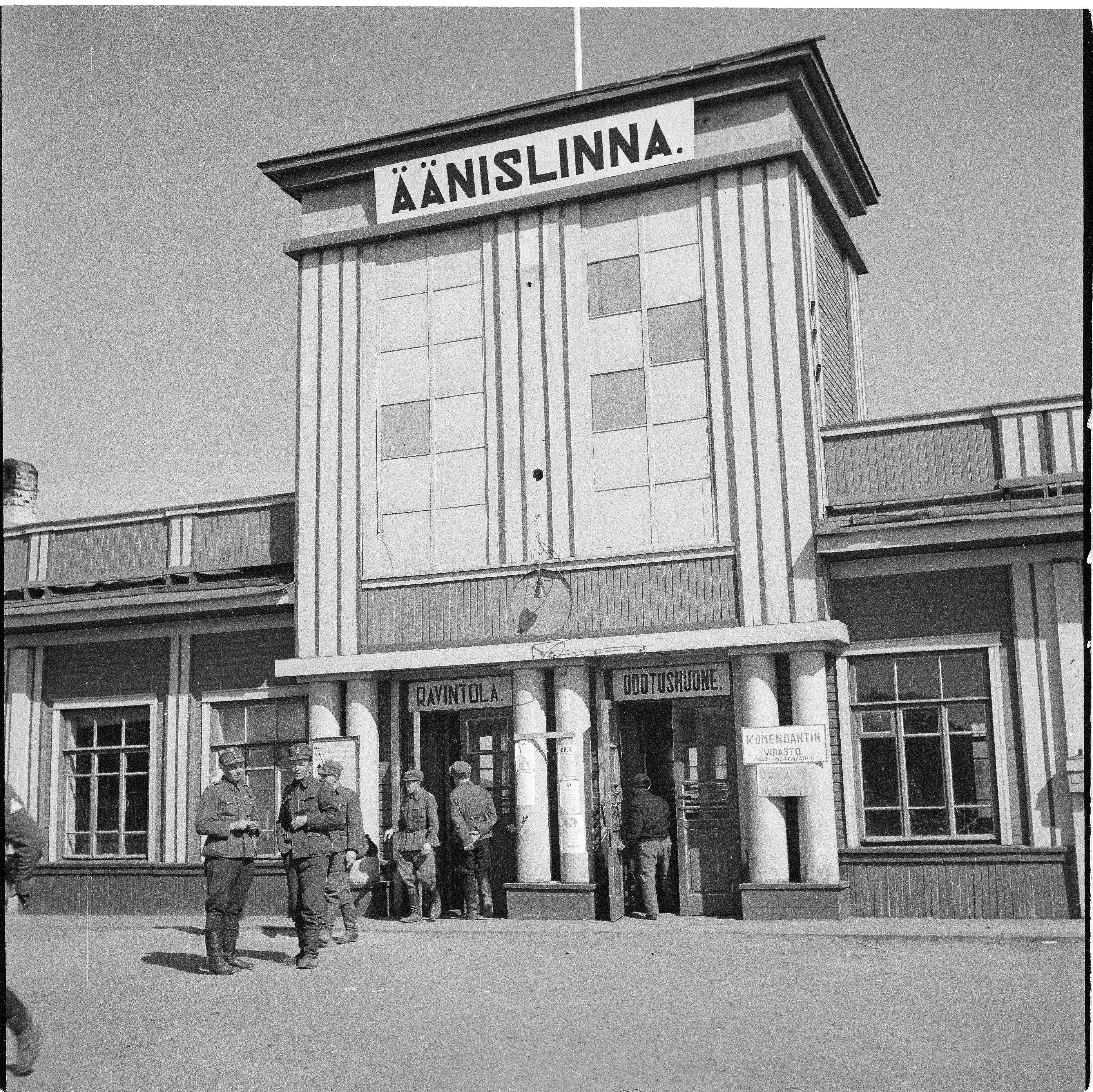 Петрозаводск, 01.05.1942